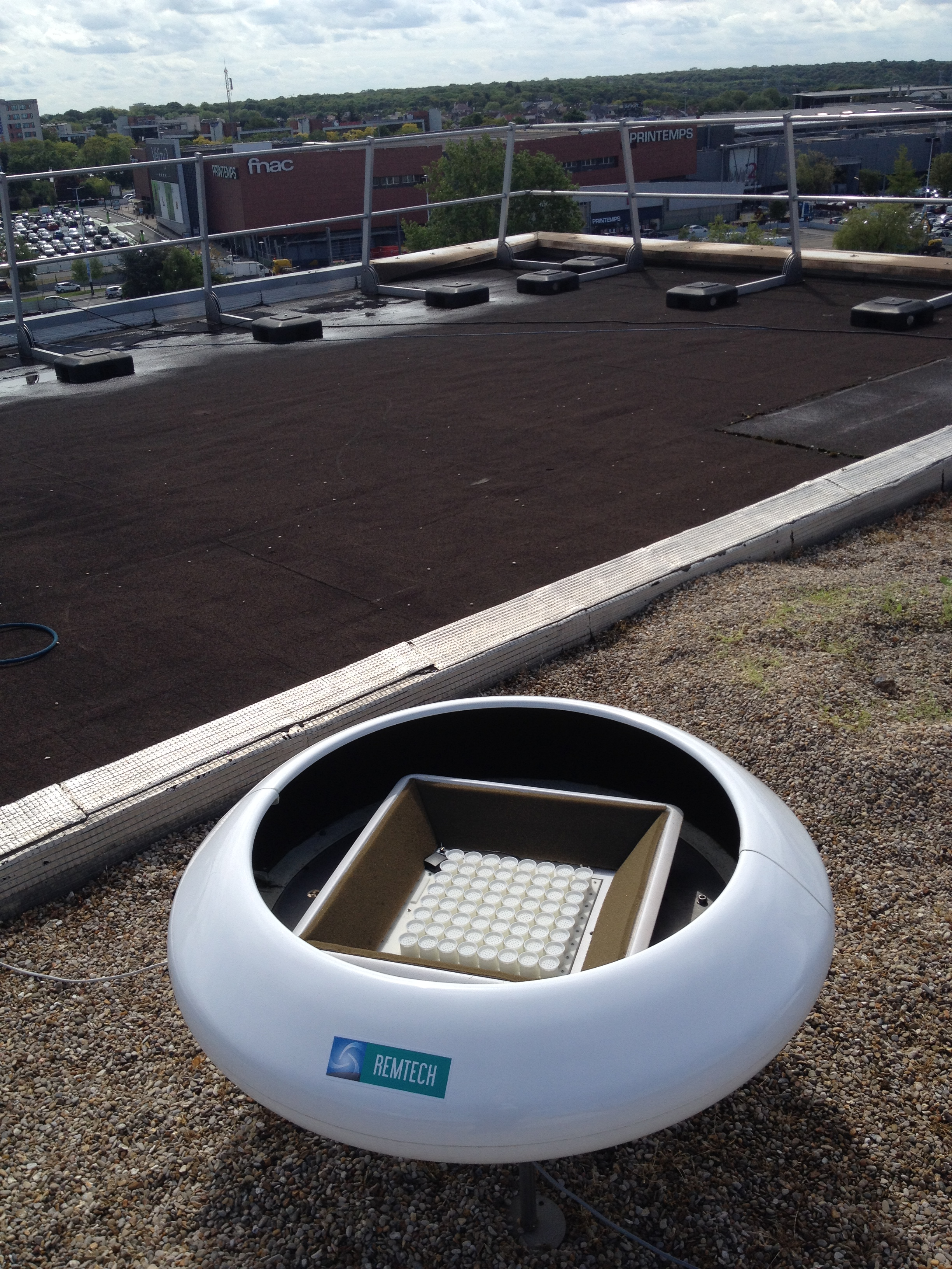 Sodar portable PA-XS de la société Remtech